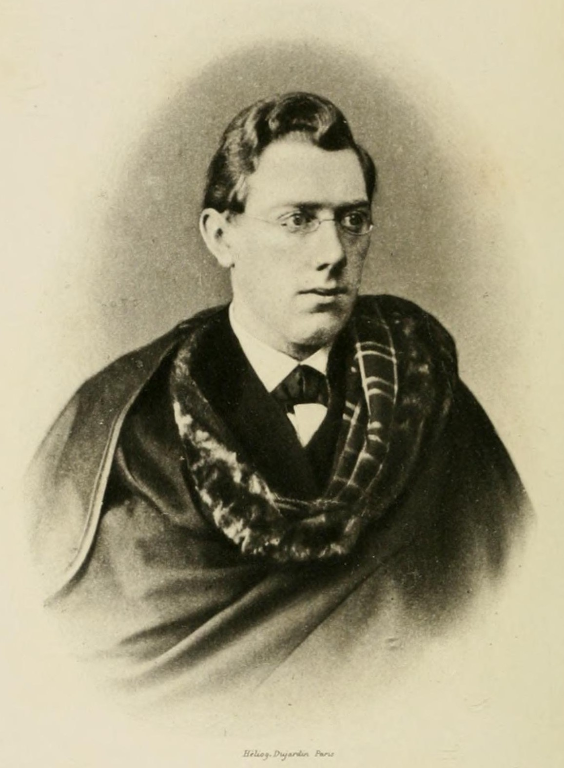 Charles Graux (1852–1882), französischer Klassischer Philologe. Fotografie (Dezember 1875) von J. Mun, Madrid.